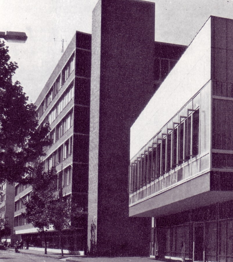 Budapesti Műszaki Egyetem, Budapest XI. Stoczek u. 1-3. 2000 adagos konyha, étterem és leánykollégium, épült 1965–1968